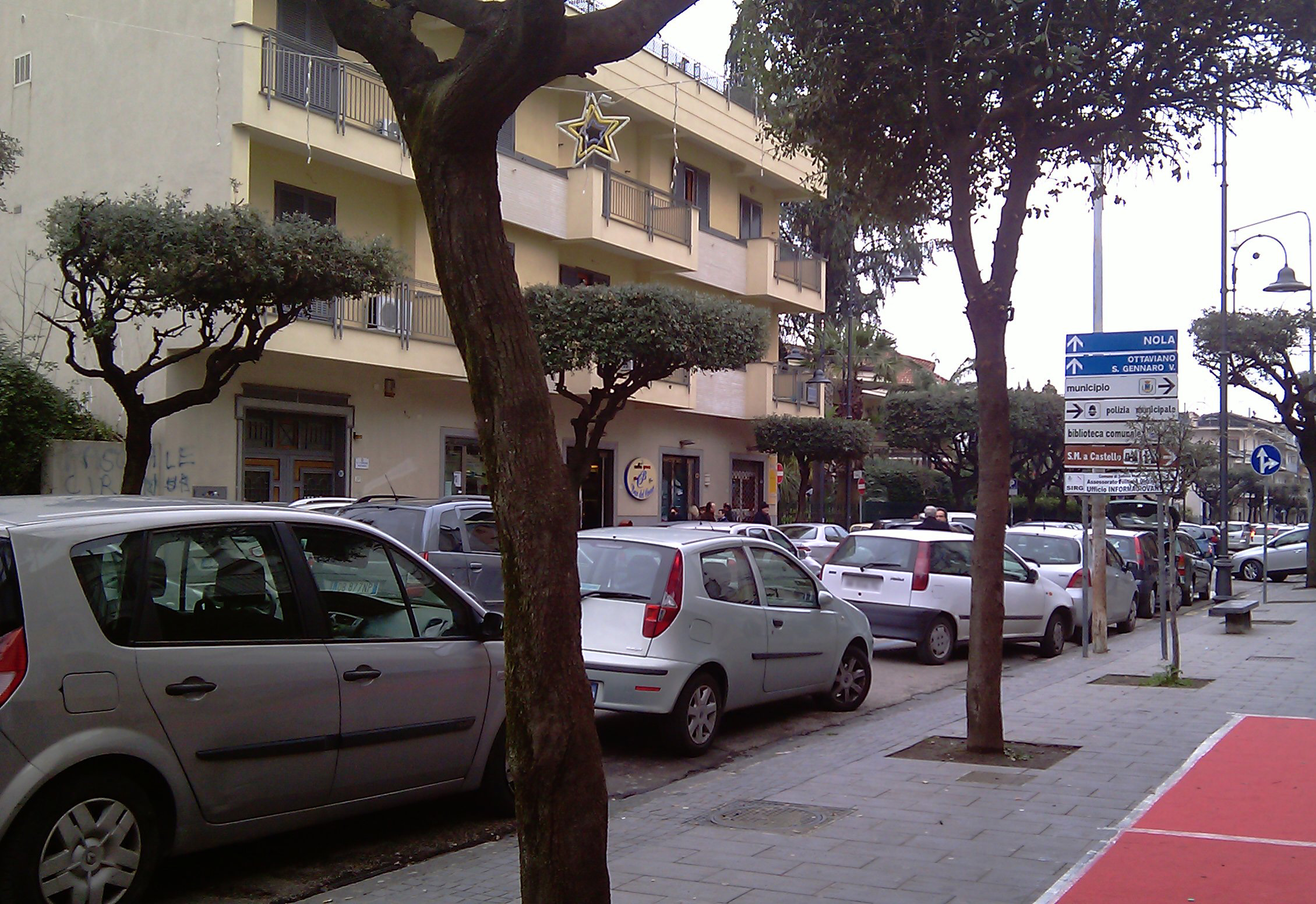 Via Aldo Moro; Somma Vesuviana